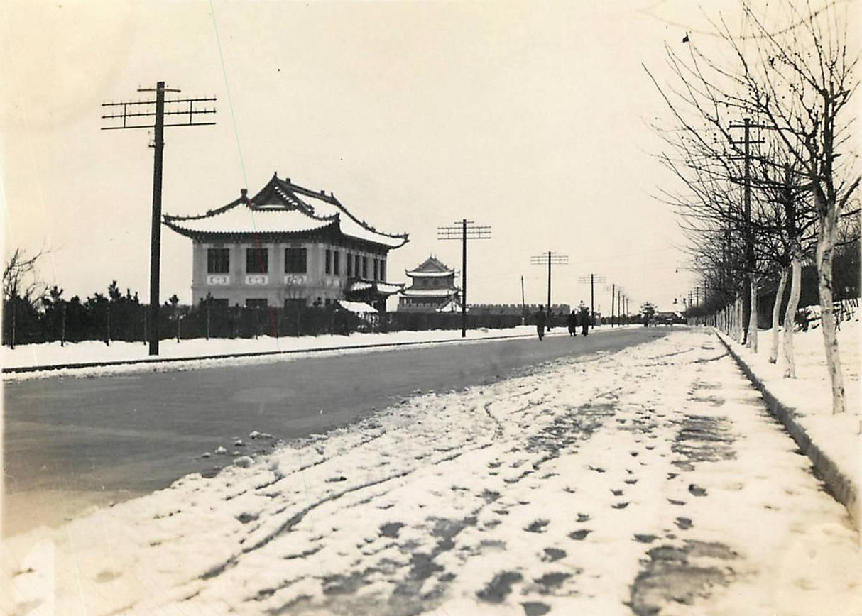 青岛莱阳路海滨生物研究所